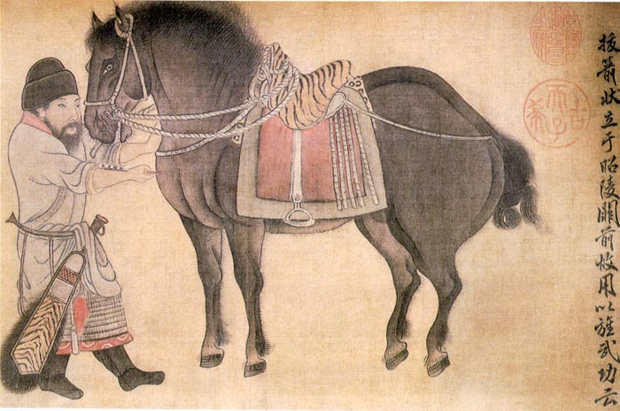 趙霖所繪《昭陵六駿圖卷》（局部）